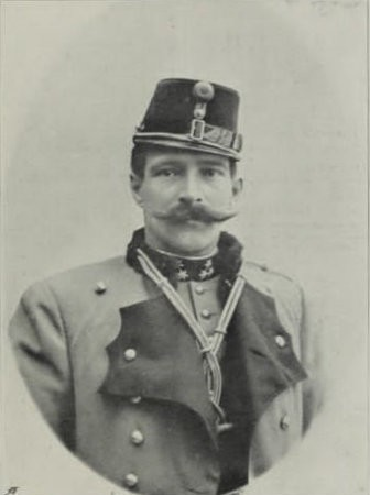 Adolf svobodný pán Odkolek (1854-1917), česko-rakouský konstruktér zbraní a důstojník Rakousko-uherské armády